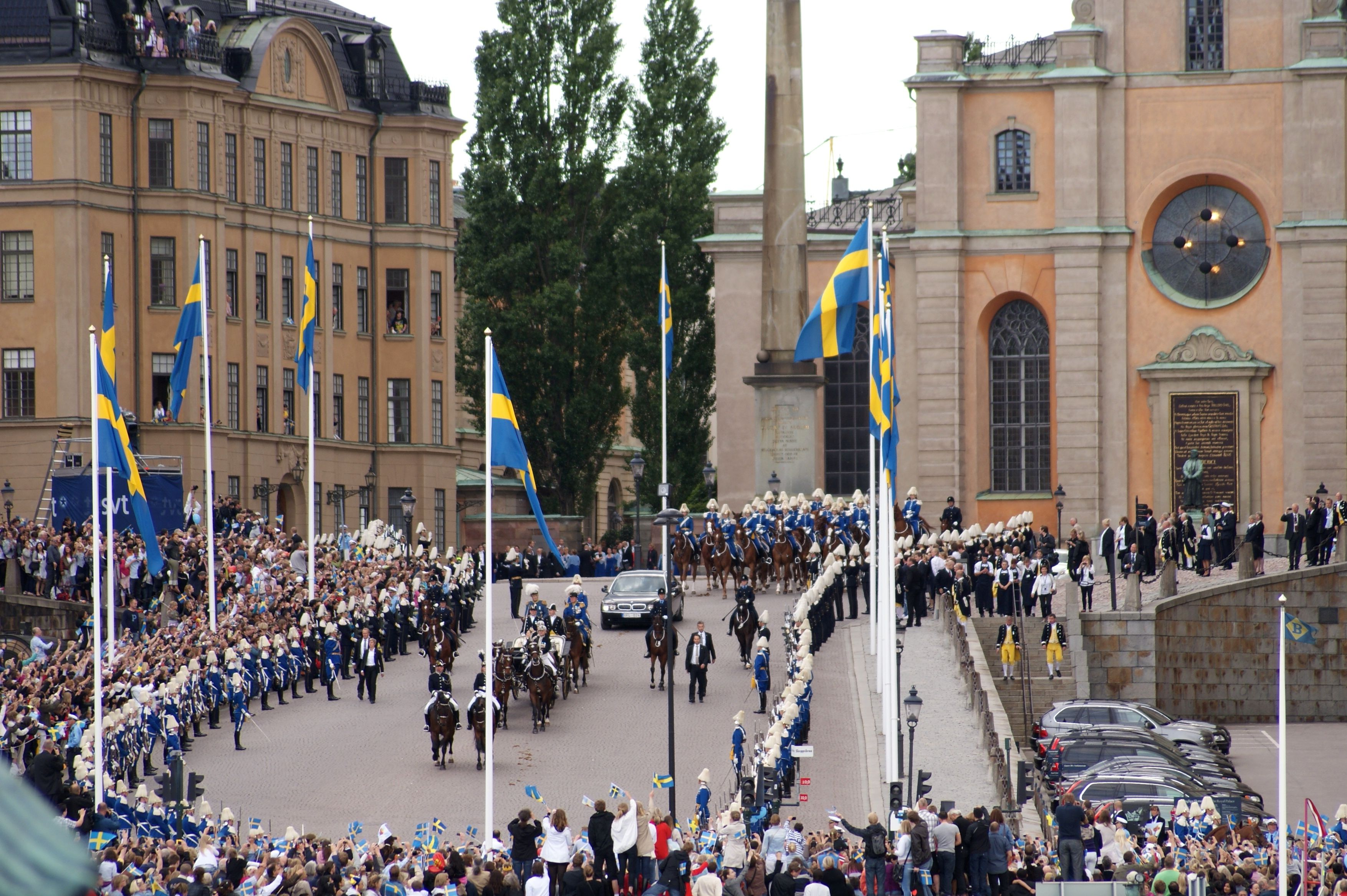 Bröllopet mellan kronprinsessan Victoria och Daniel Westling; Kortegen i Slottsbacken